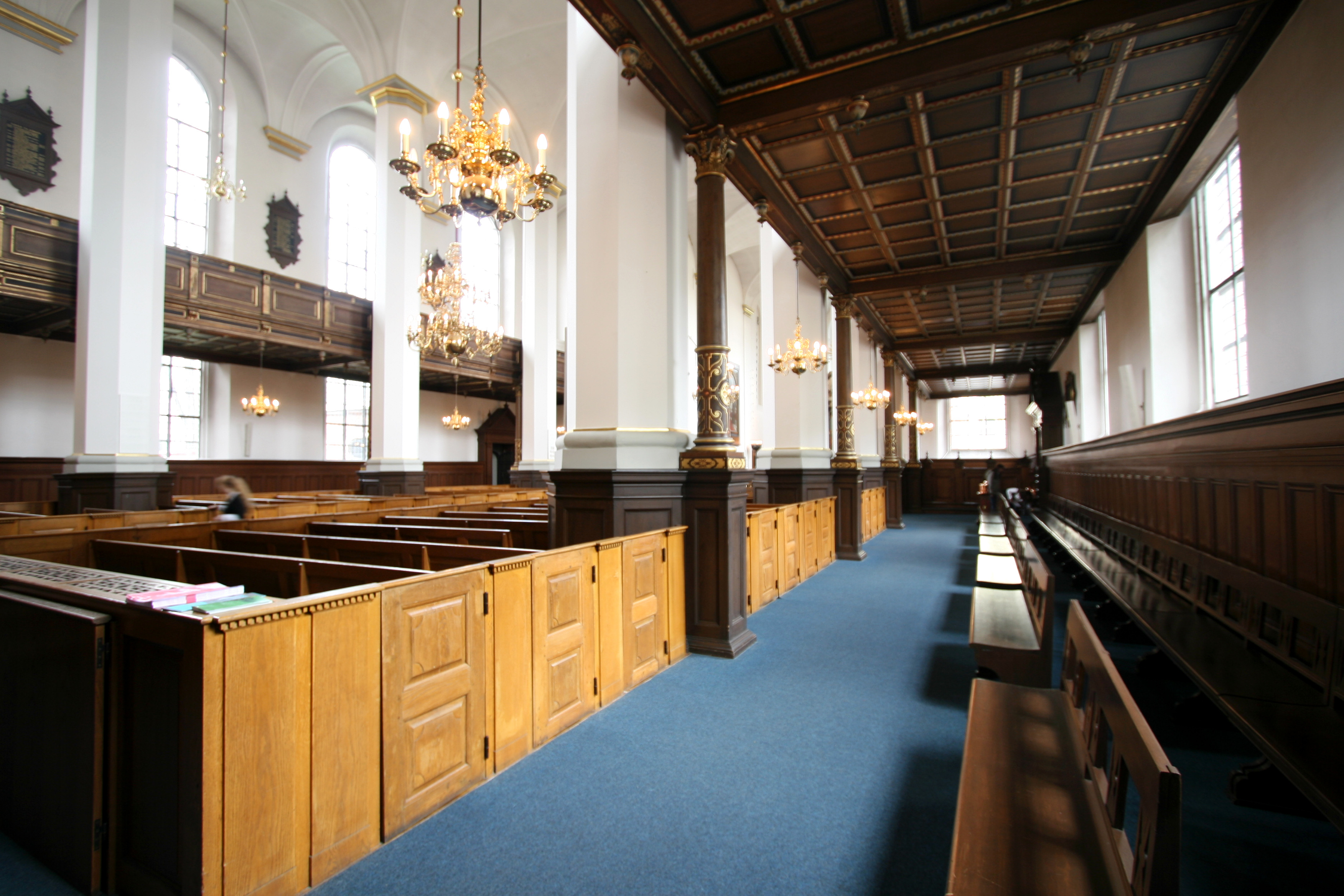 Helligåndskirken, Copenhagen, Denmark. Interior, south aisle.